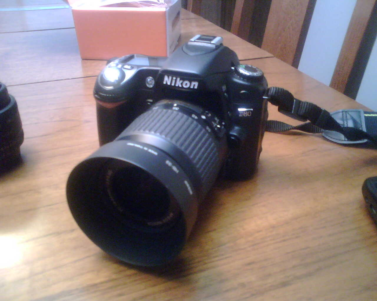 A Nikon D80.Nikon d80